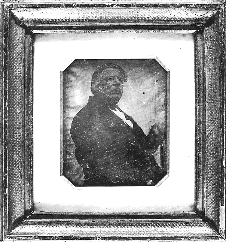 Karl Friedrich Ludwig Freiherr von Schiller (Daguerreotypie, Maße 85 × 67 mm; mit Rahmen 165 × 150 mm)